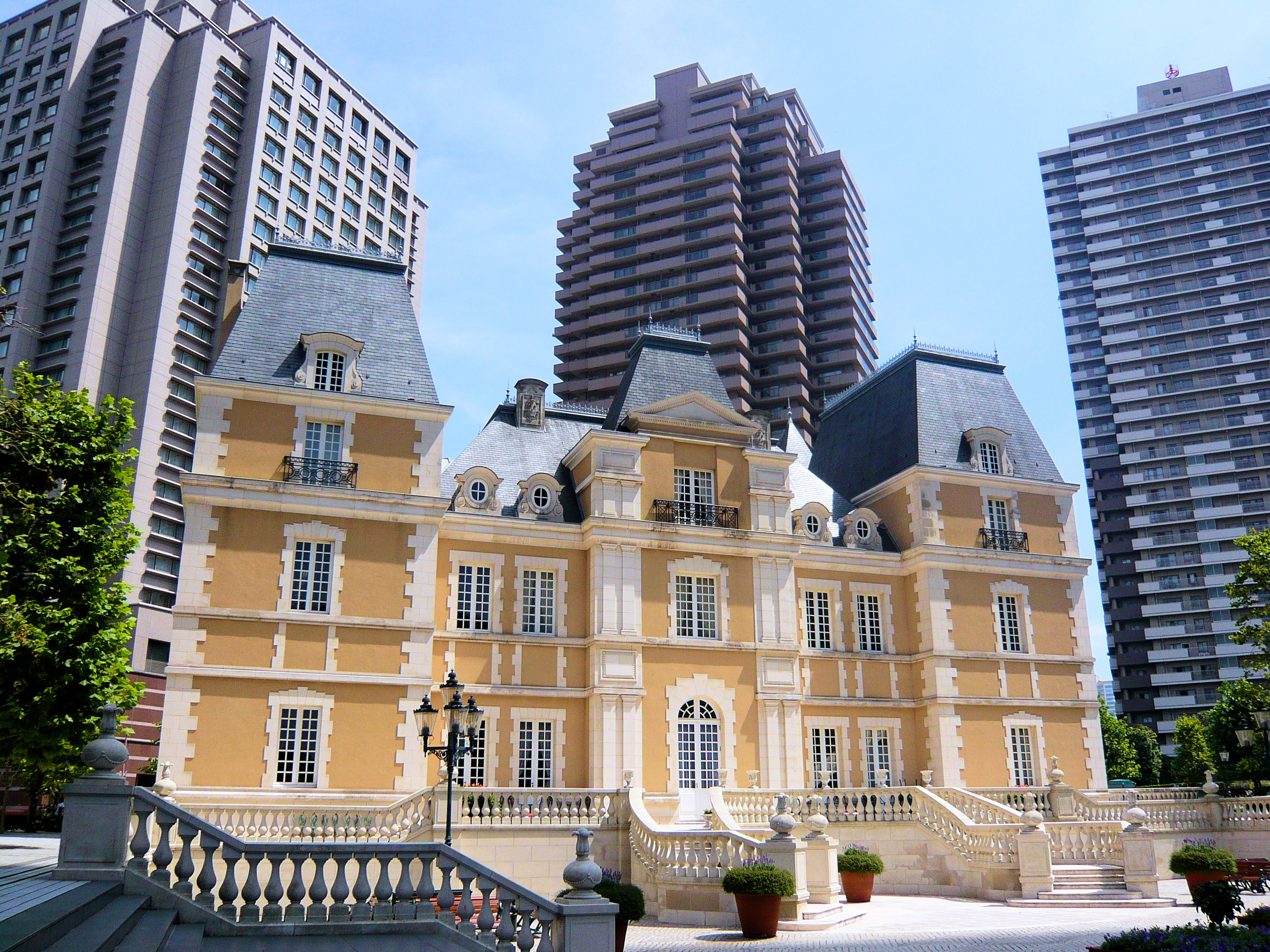 Ebisu Garden Place, Tokyo